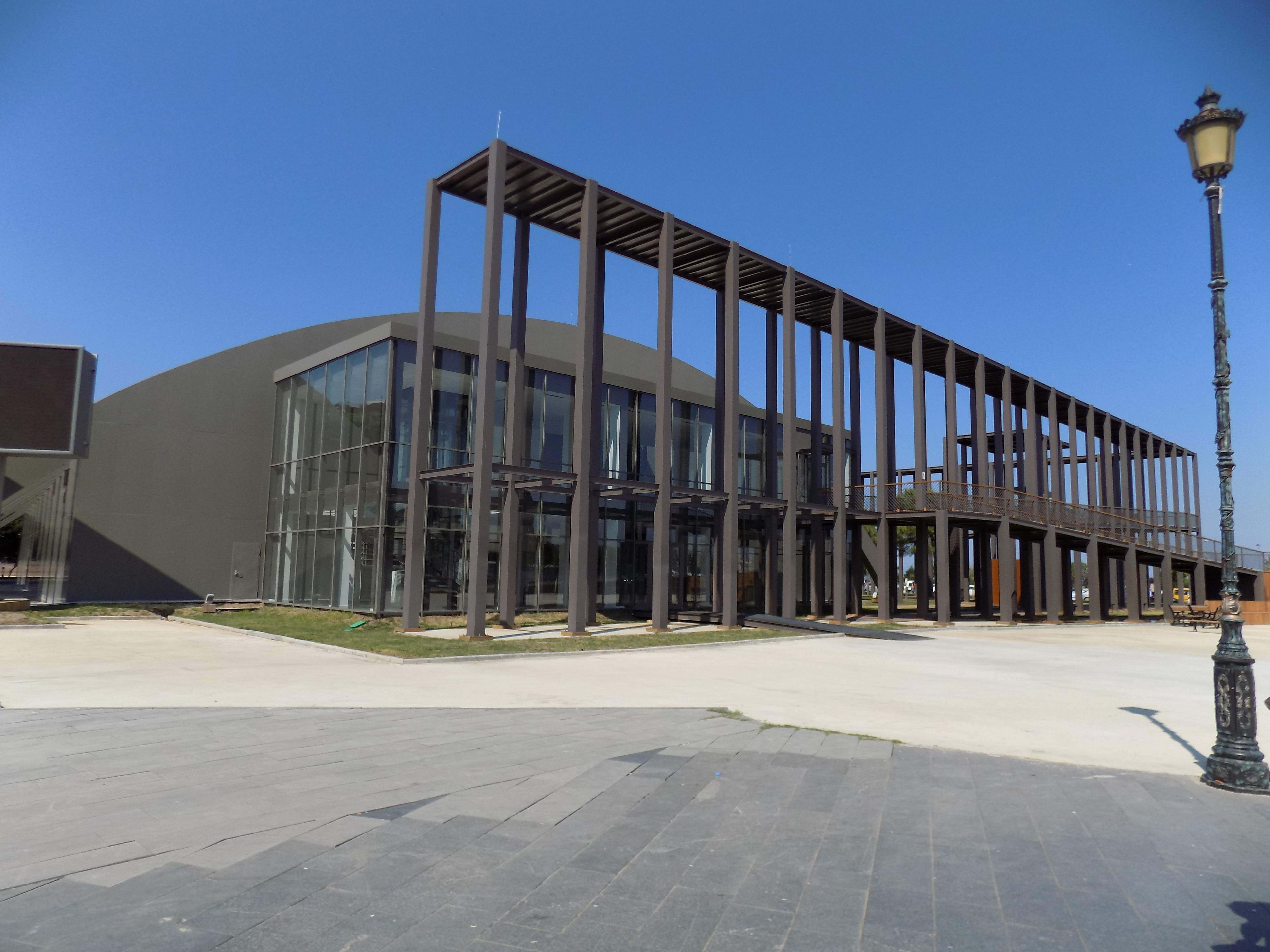 Samsun'daki Cumhuriyet Meydanı civarında yer alan Panorama 1919 Müzesi.